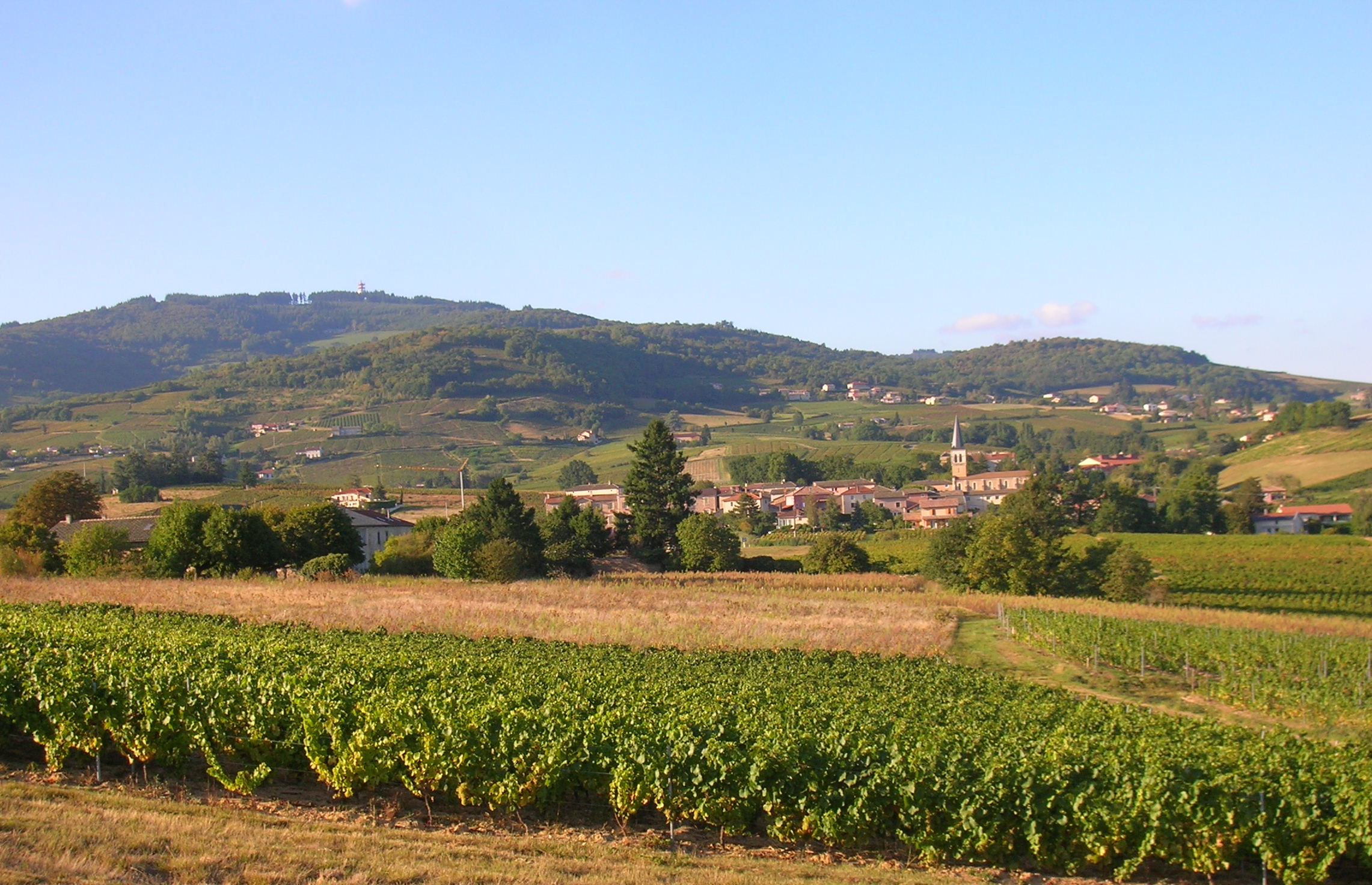 Lantignié, Rhône, FRANCE